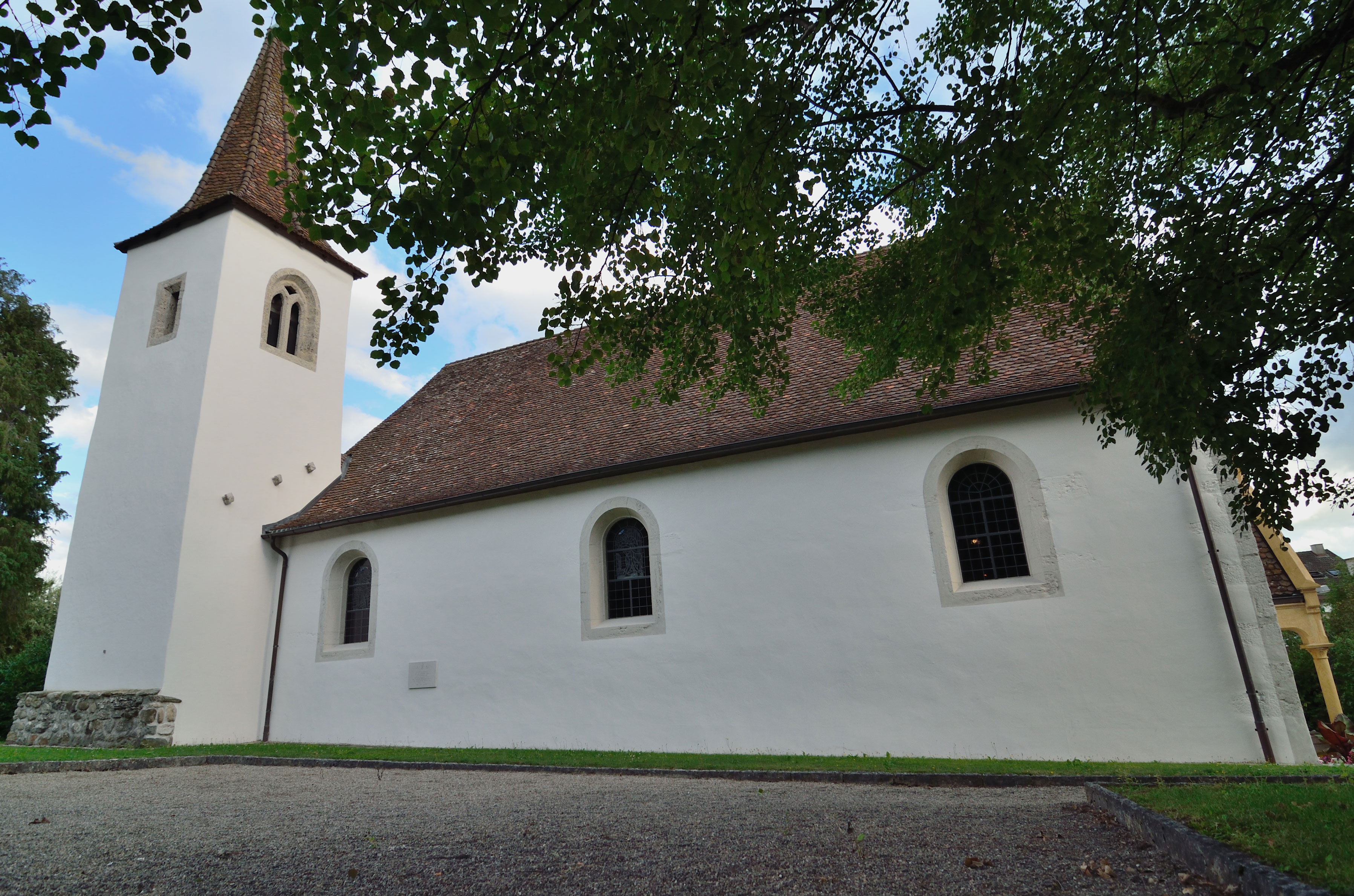 Blanche Eglise de la Neuveville, face nord